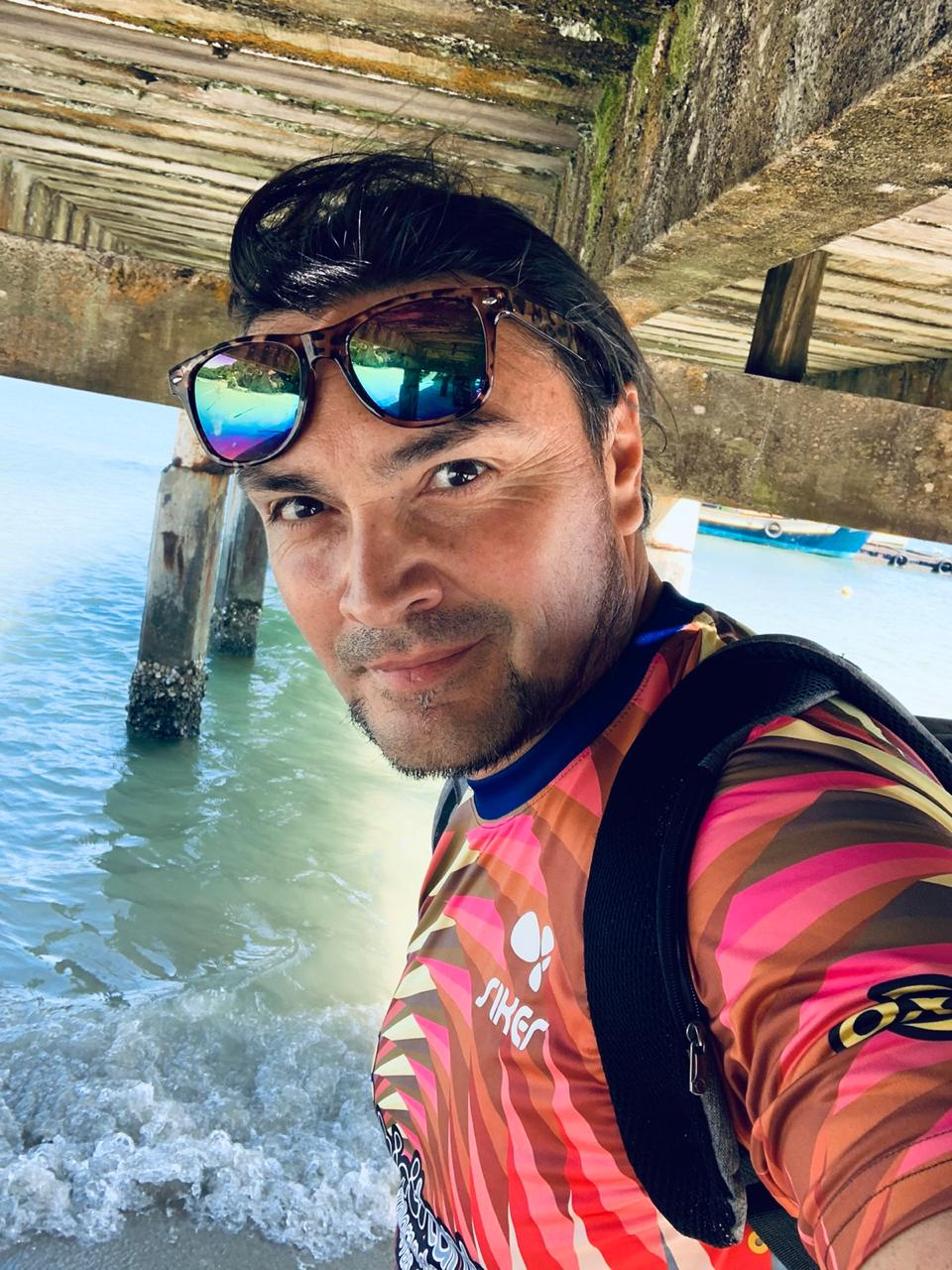 De viajecito